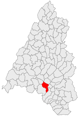 Categorie:Hărţi ale judeţului Bihor